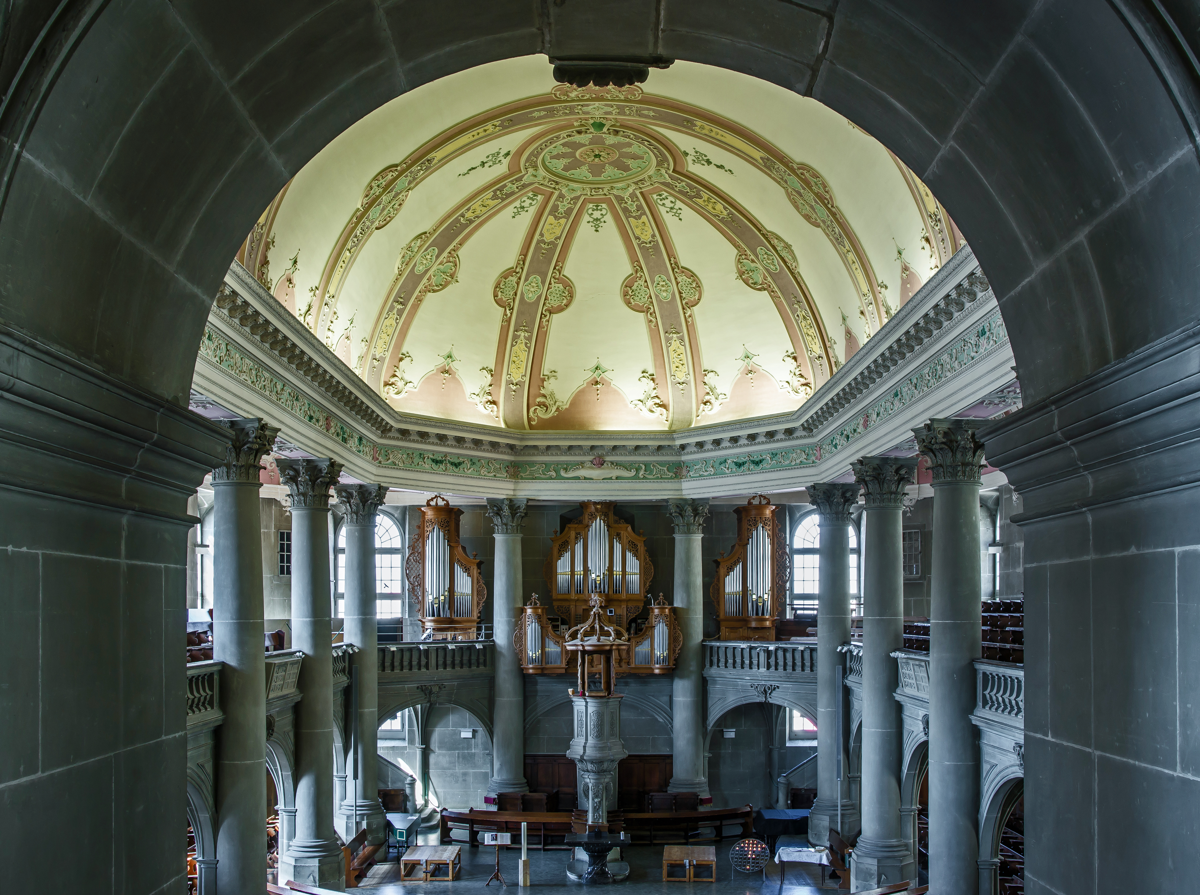 Barocke Gestaltung des Innenraumes und der Tonnendecke von der Eingangsseite her aufgenommen.